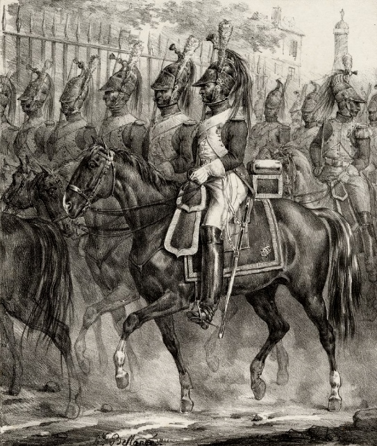 Dragons de la Garde impériale en grande tenue